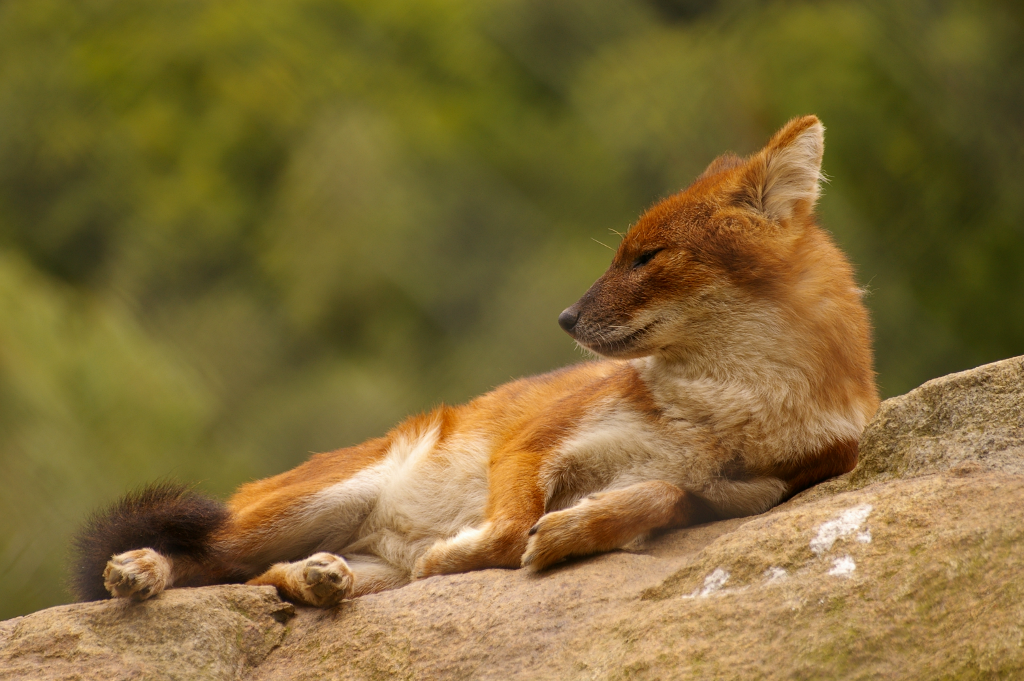 Captive dhole, ZooParc de Trégomeur, Brittany, France.